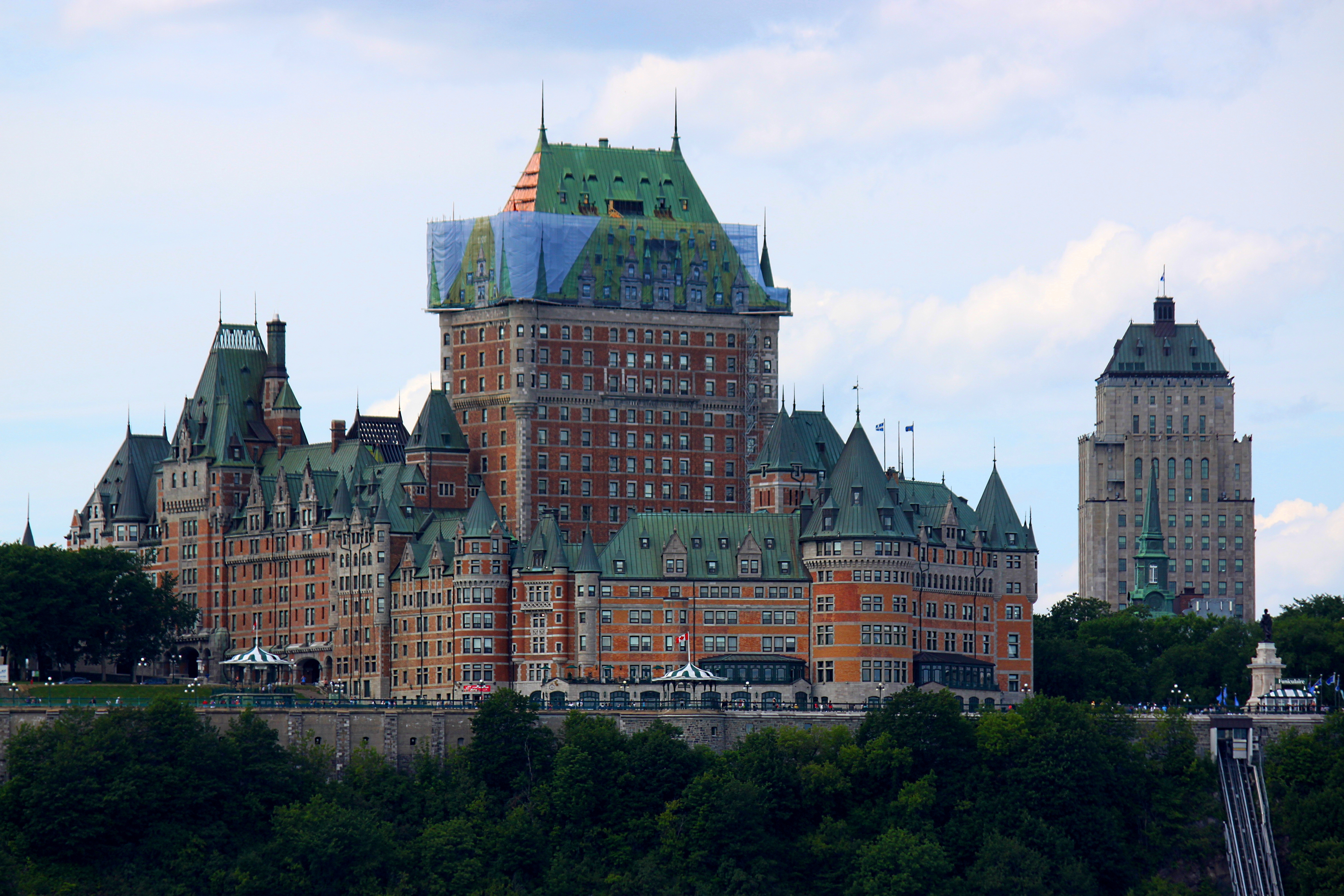 Château Frontenac aufgenommen am 27. Juli 2011 von der Ferry Ramp in Québec City